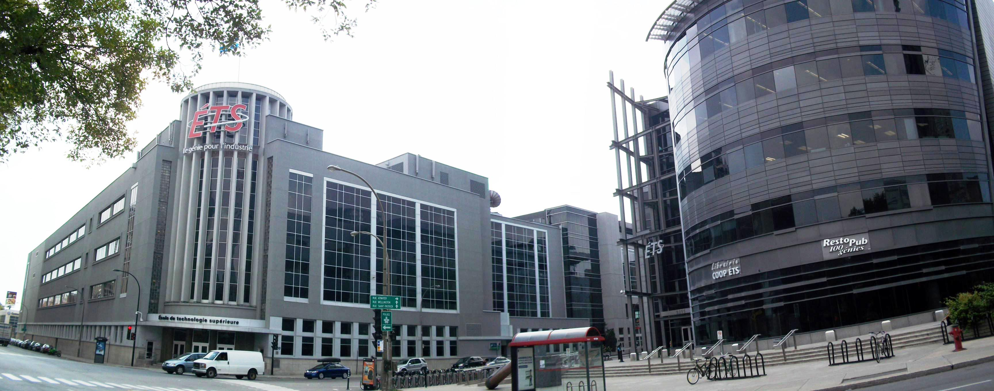 École de technologie supérieure, 1100, rue Notre-Dame Ouest, Montréal